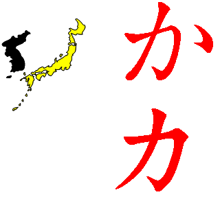 Original text : Die Silbe "ka" in japanischer Schrift